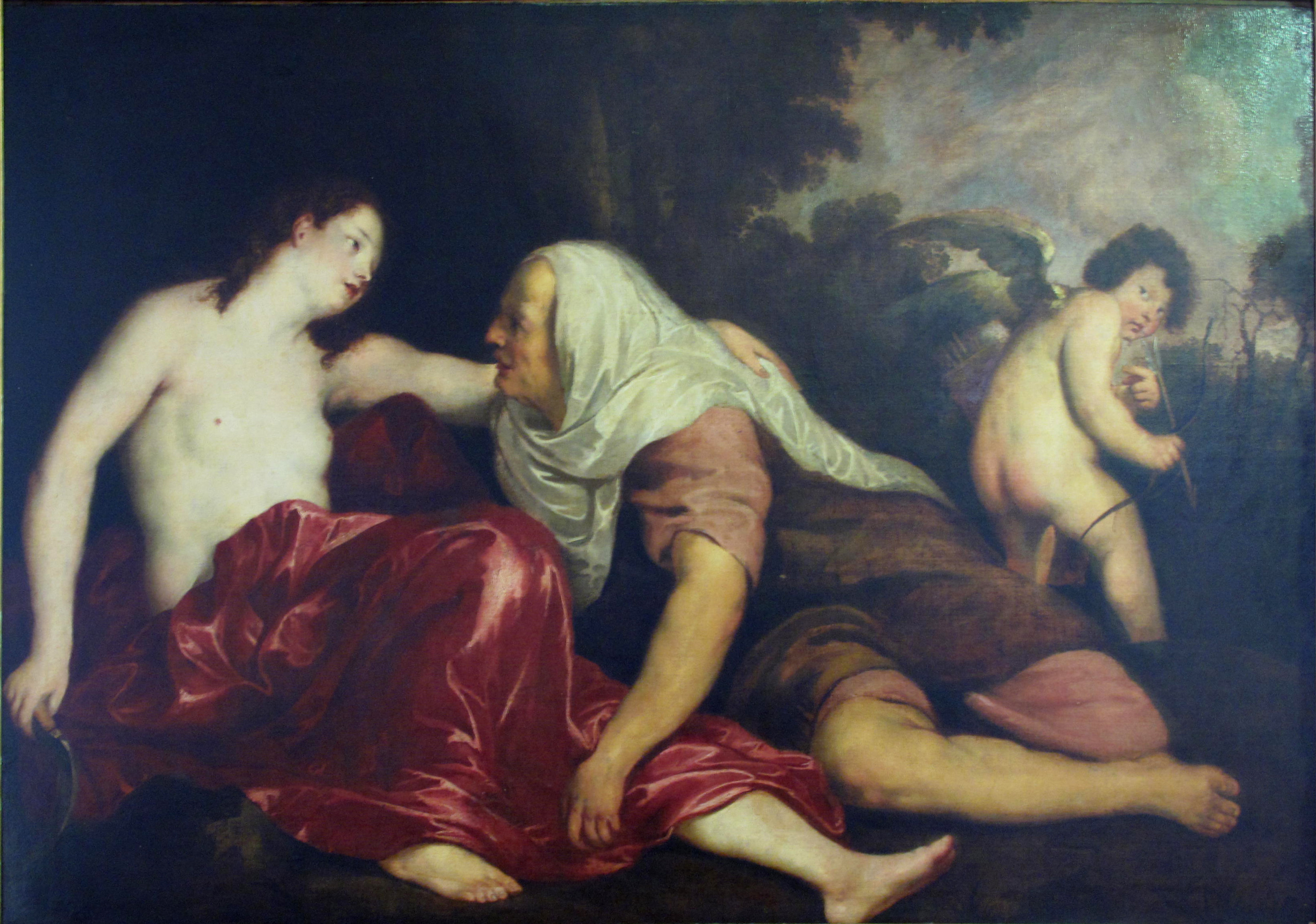 Vertumno e Pomona, 1621 - 1622